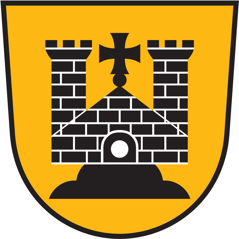 Wappen von Arnoldstein